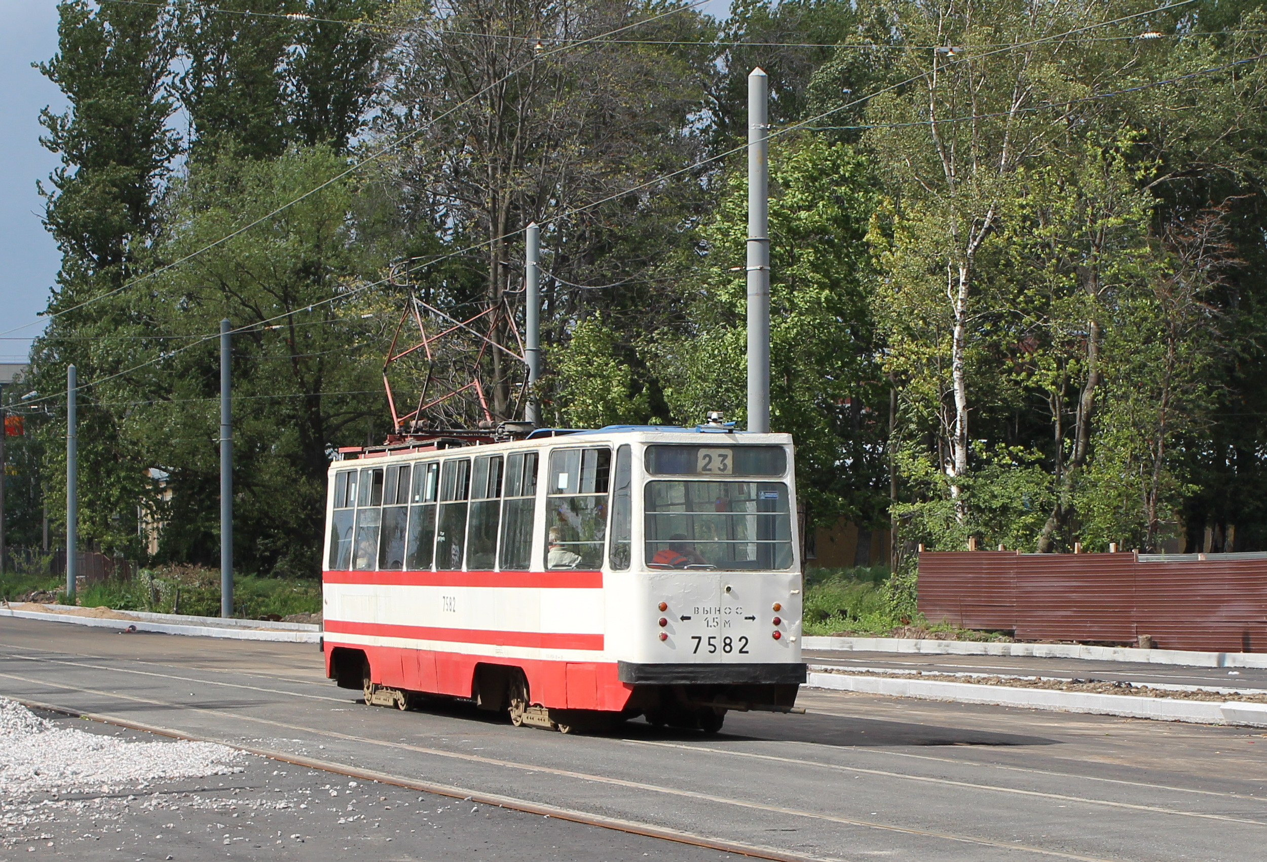 Вагон ЛМ68-М на улице Жукова по 23 маршруту. Вид сзади. Август 2013г.